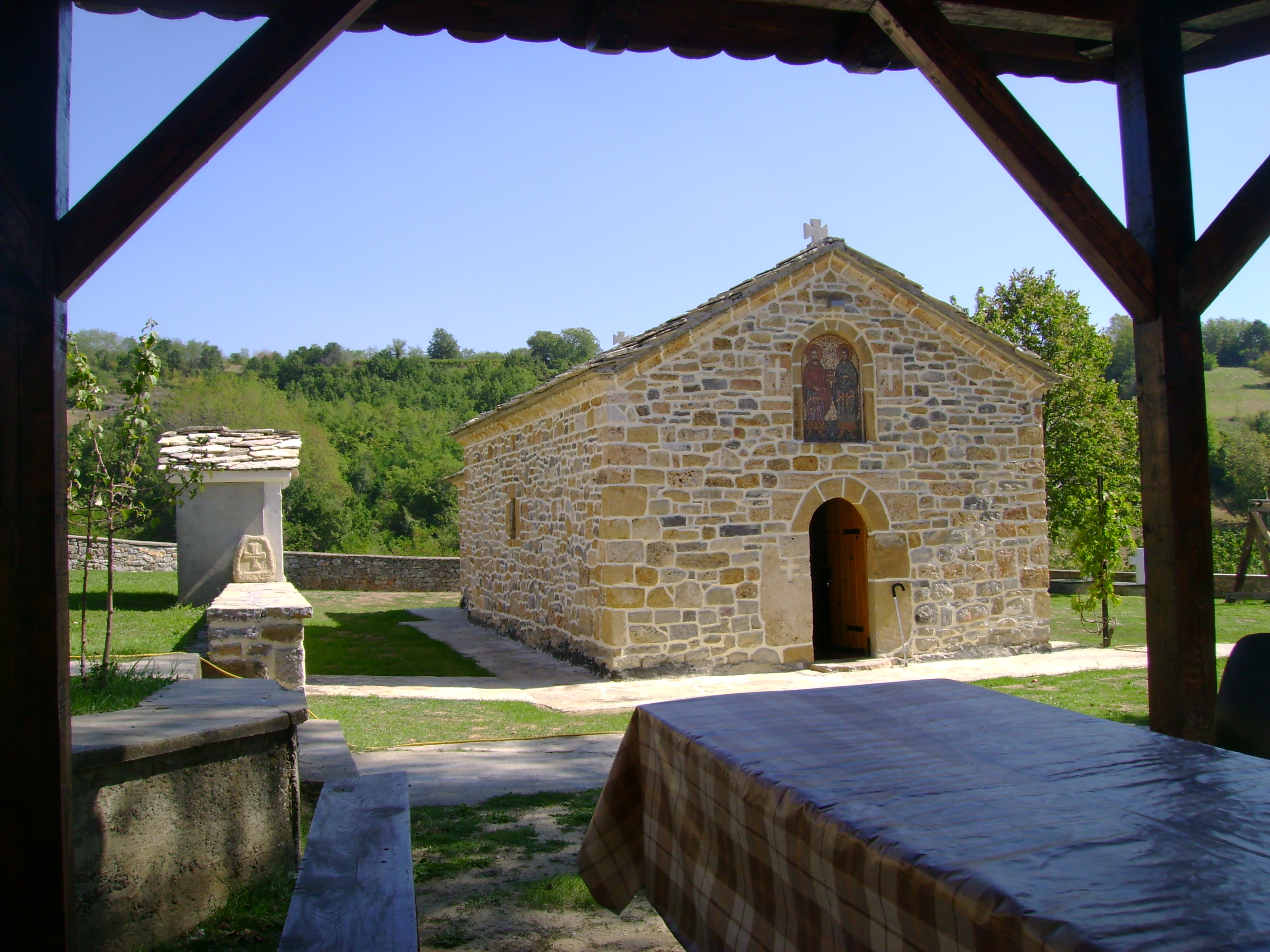 Косово и Метохија